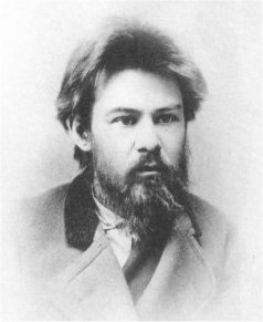 Lev Aleksandrovič Tichomirov (1852-1923)